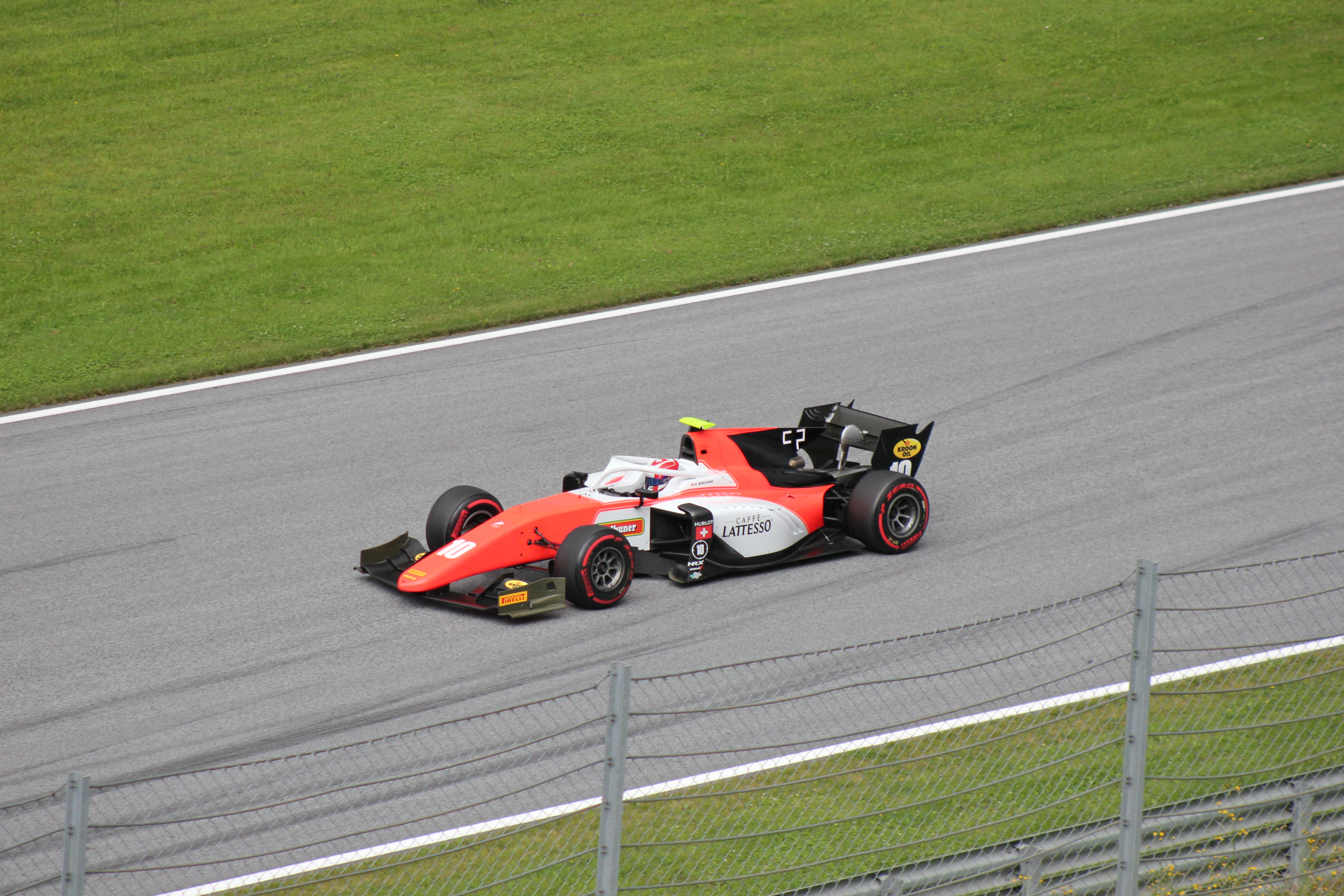 10 Ralph Boschung beim Rennwochenende in Österreich 2018 (1)